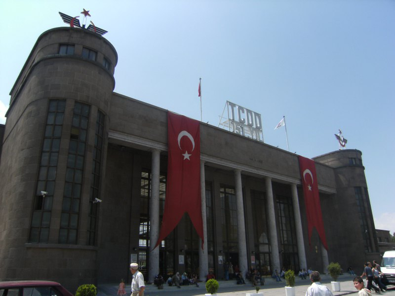 Ankara Tren Garı